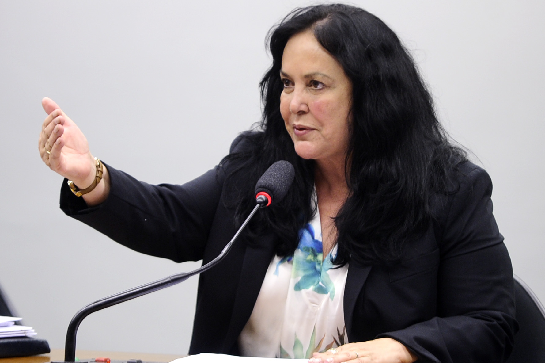 Comissão Mista de Planos, Orçamentos Públicos e Fiscalização (CMO) realiza reunião extraordinária. Em destaque, senadora Rose de Freitas (PMDB-ES). Foto: Marcos Oliveira/Agência Senado.